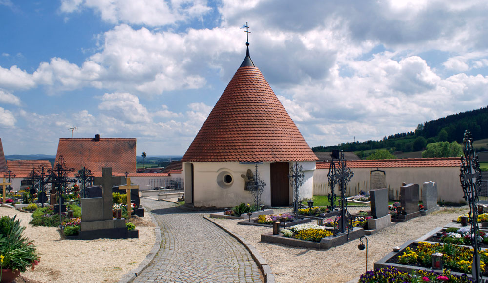 Romanische Kapelle auf dem Friedhof in Rottendorf, Schmidgaden